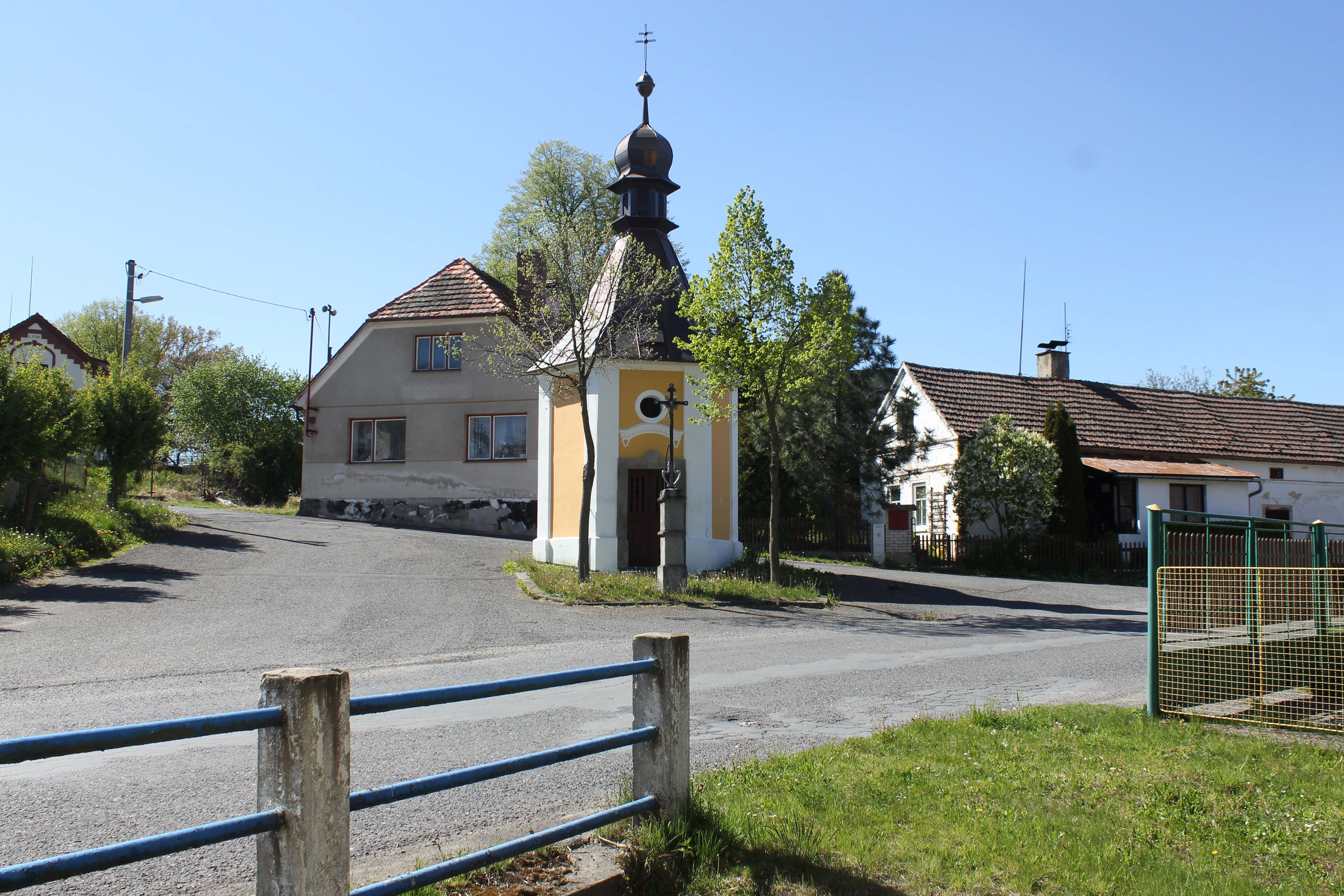 Kaplička v Bezděkově pod Třemšínem